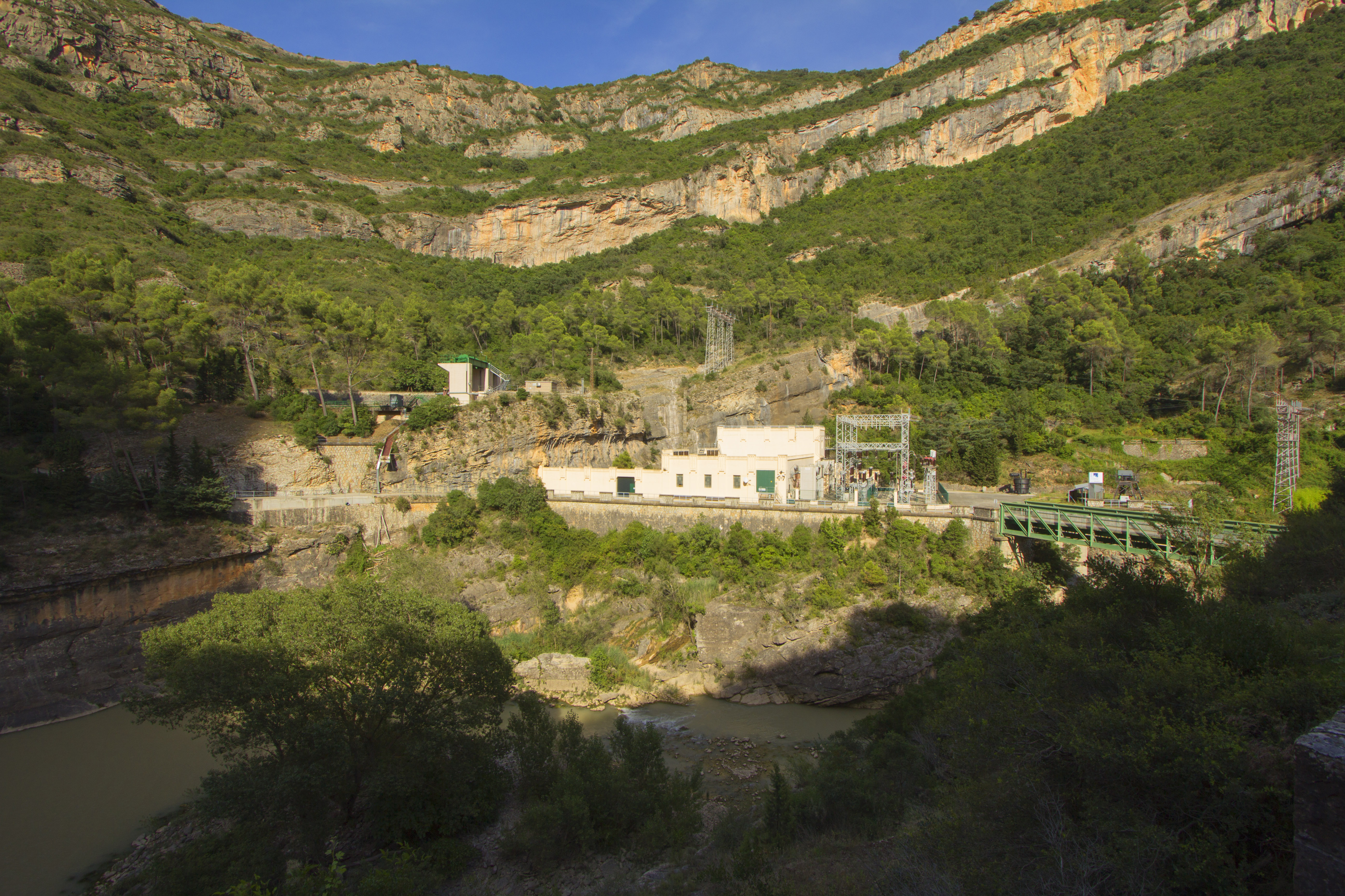 Edifici principal de la central hidroelèctrica de Terradets, Llimiana (Pallars Jussà)